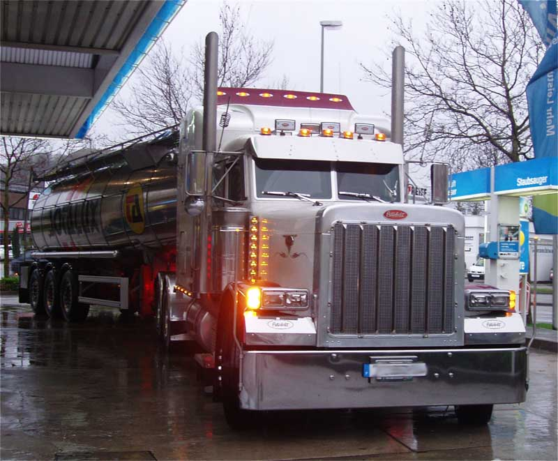 amerikanisches Standlicht bei einem amerikanischen Truck